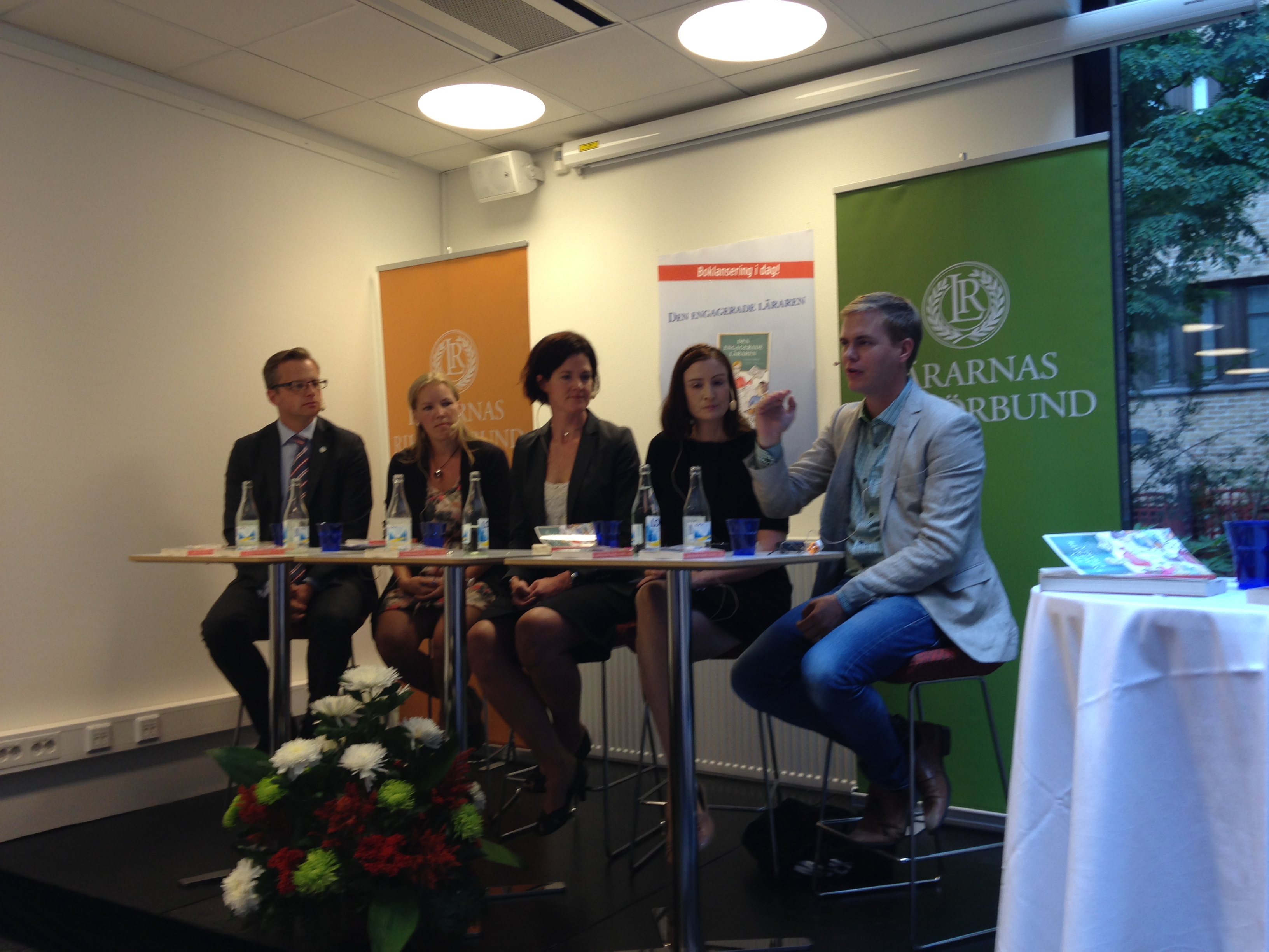 Skoldebatt